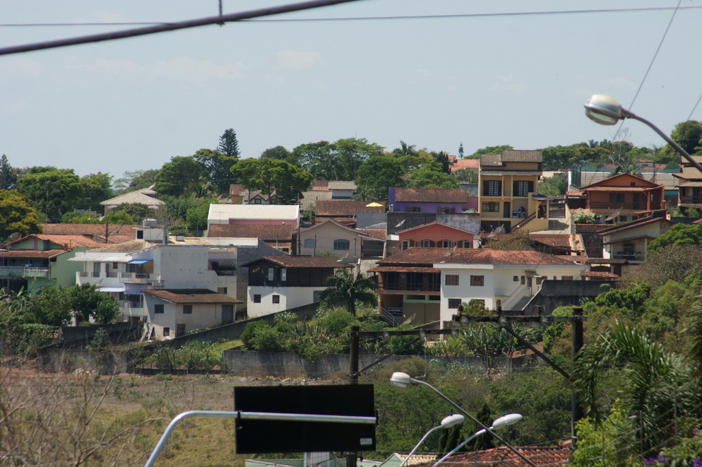 Imagem do município de Jarinu, estado de São Paulo, Brasil.